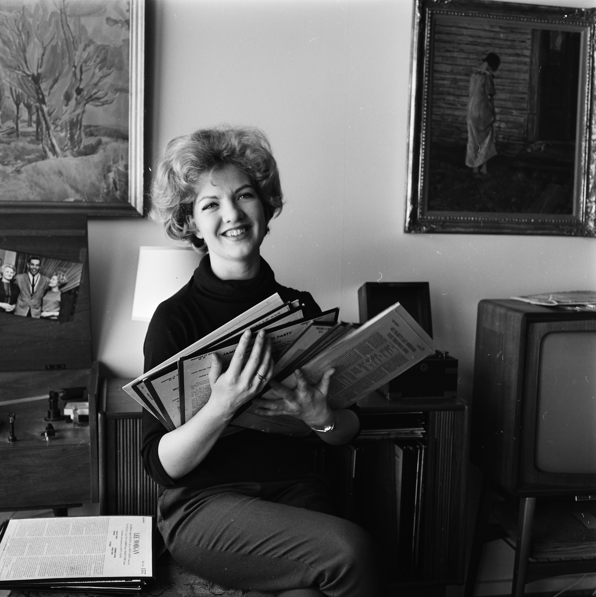 Laila Dalseth (født 1940) er en norsk jazzvokalist, kjent fra en rekke innspillinger og internasjonale samarbeid.